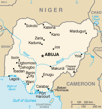 Karte von Nigeria